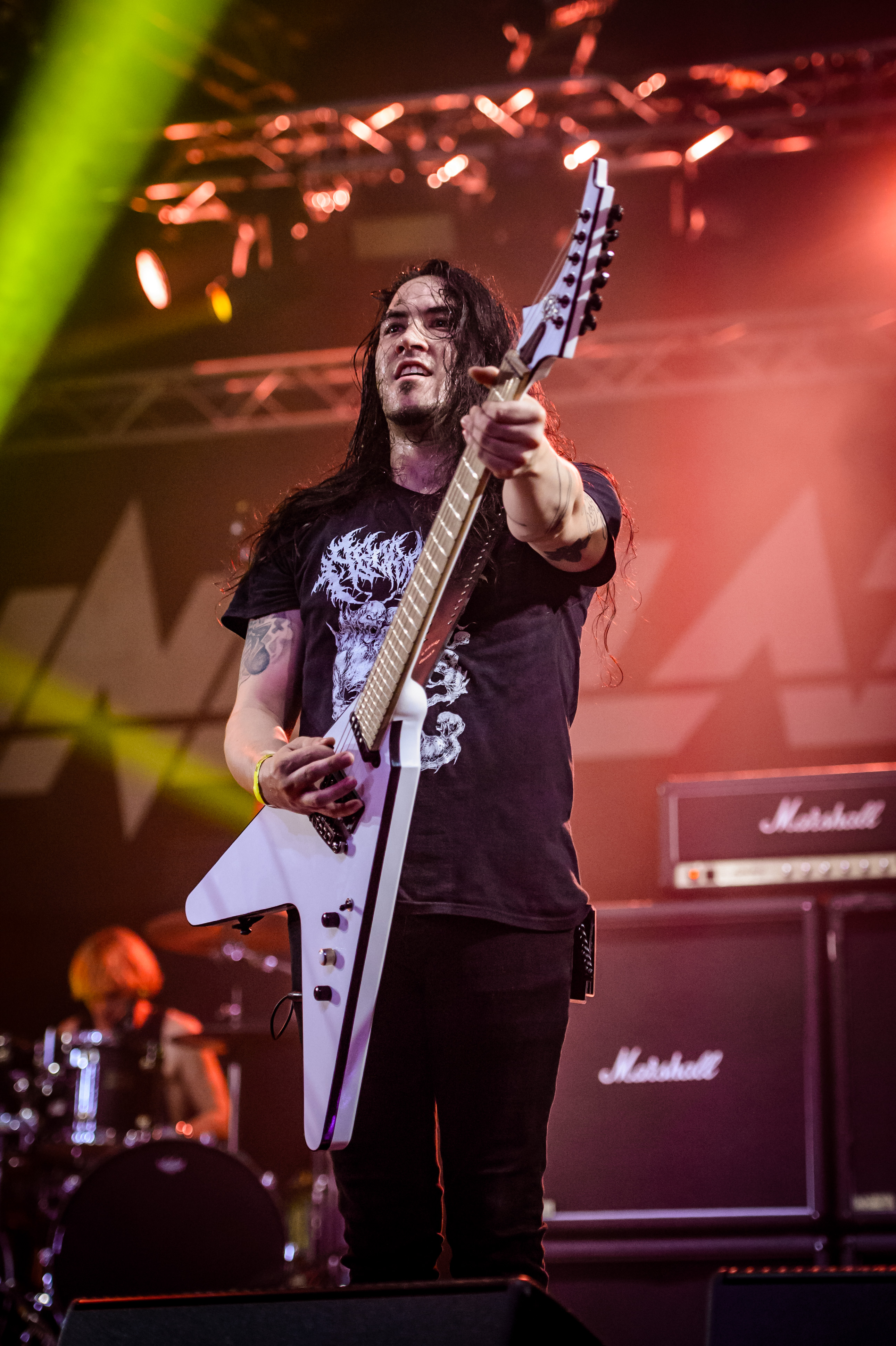 'Wacken Open Air 2017; Wacken': 'Annihilator'